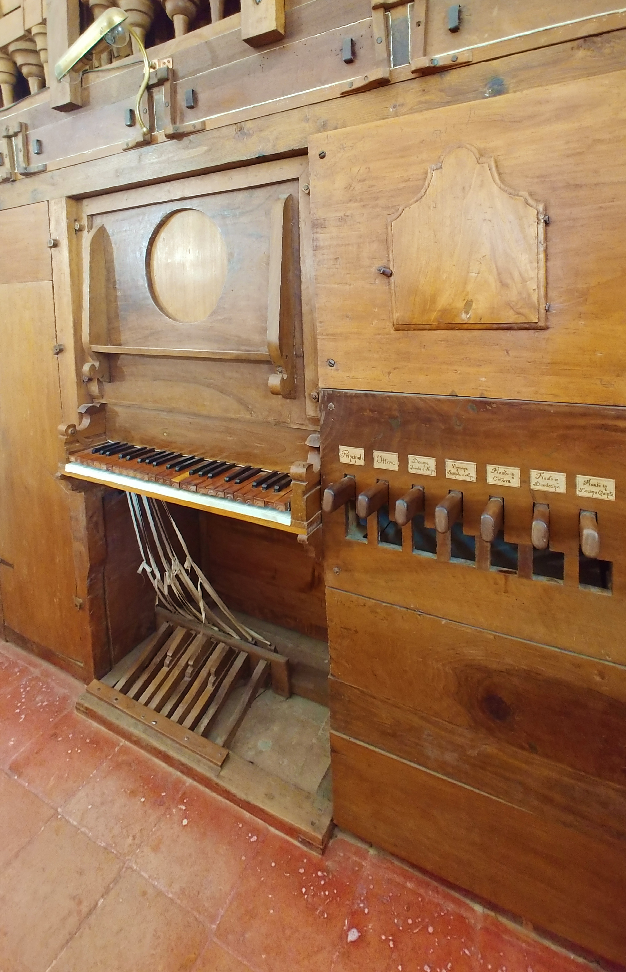 Consolle.